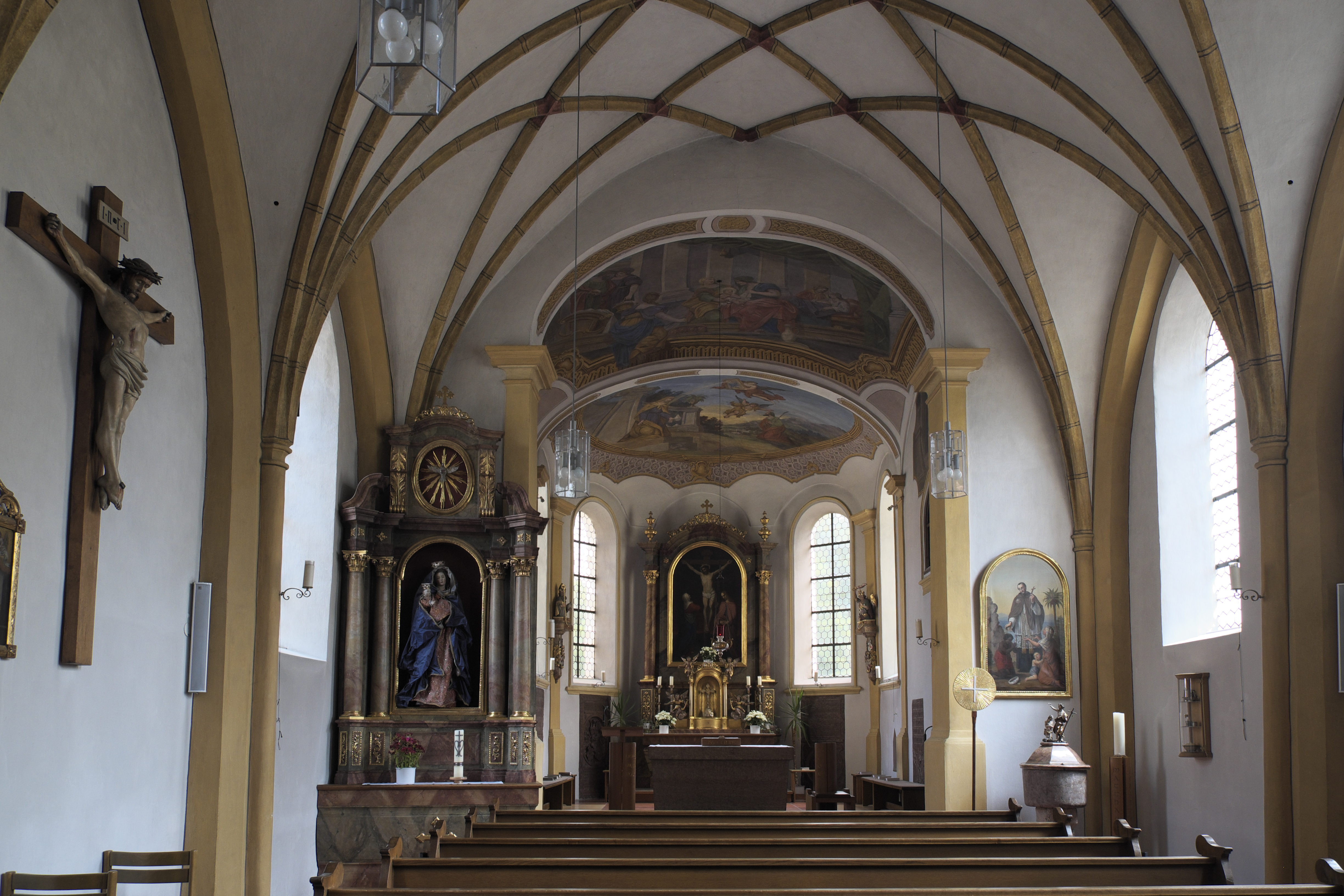 Katholische Pfarrkirche Mariä Geburt in Höhenkirchen-Siegertsbrunn im Landkreis München (Bayern, Deutschland), Innenraum